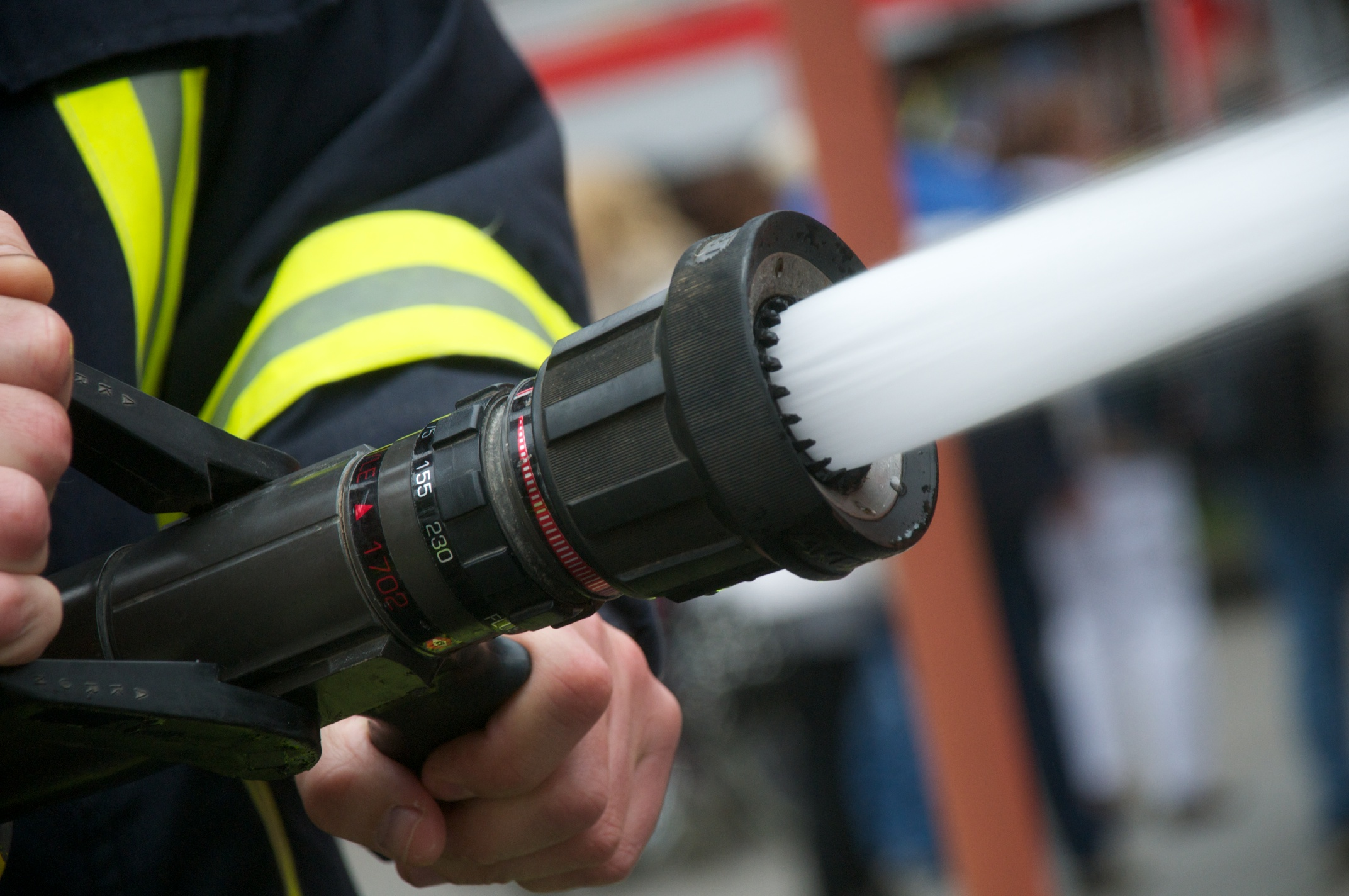 Feuerwehreinsatz Werksfeuerwehr Diakonische Stiftung Wittekindshof